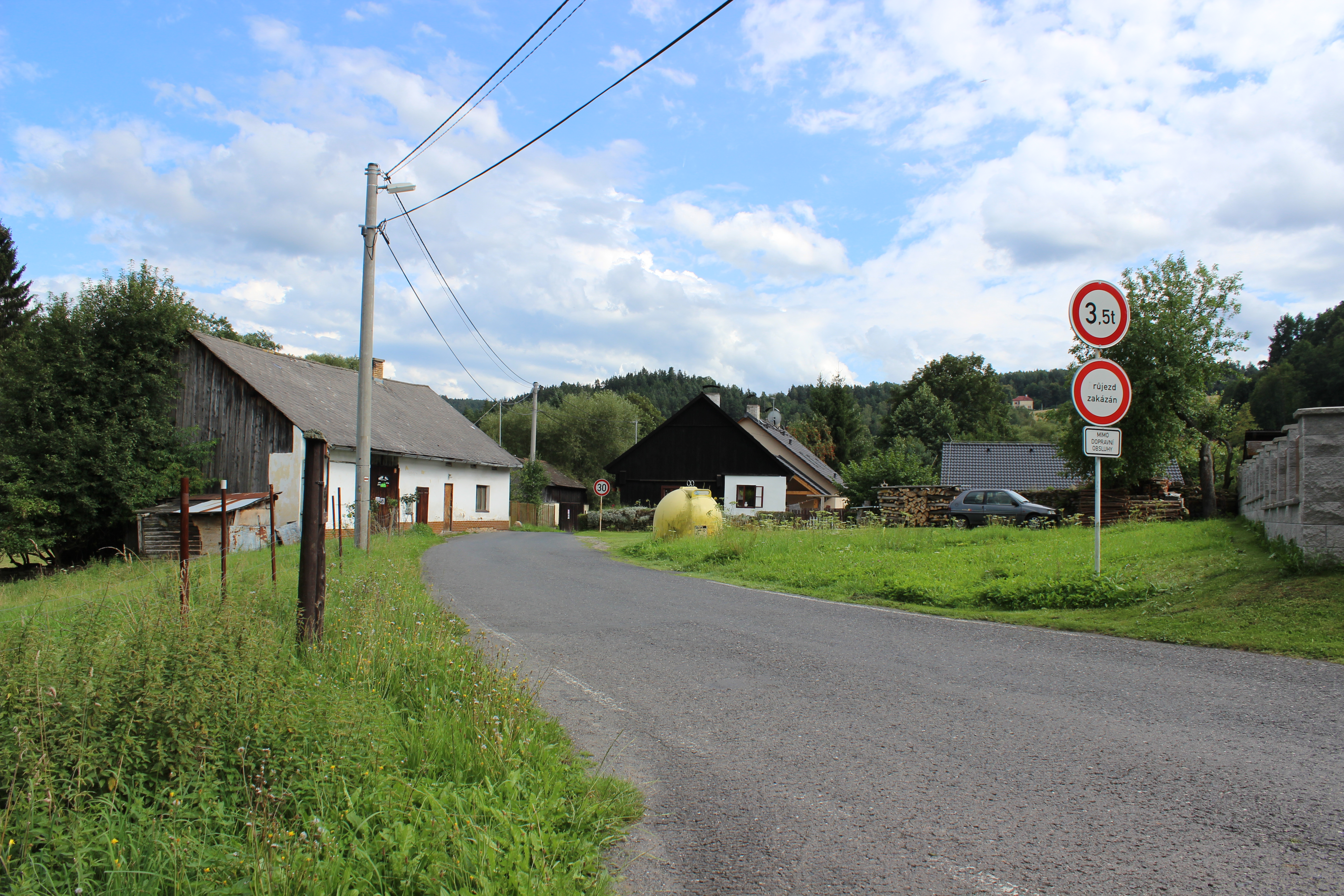 Zástavba v Novém Městečku, části Dlouhé Vsi v klatovském okrese.